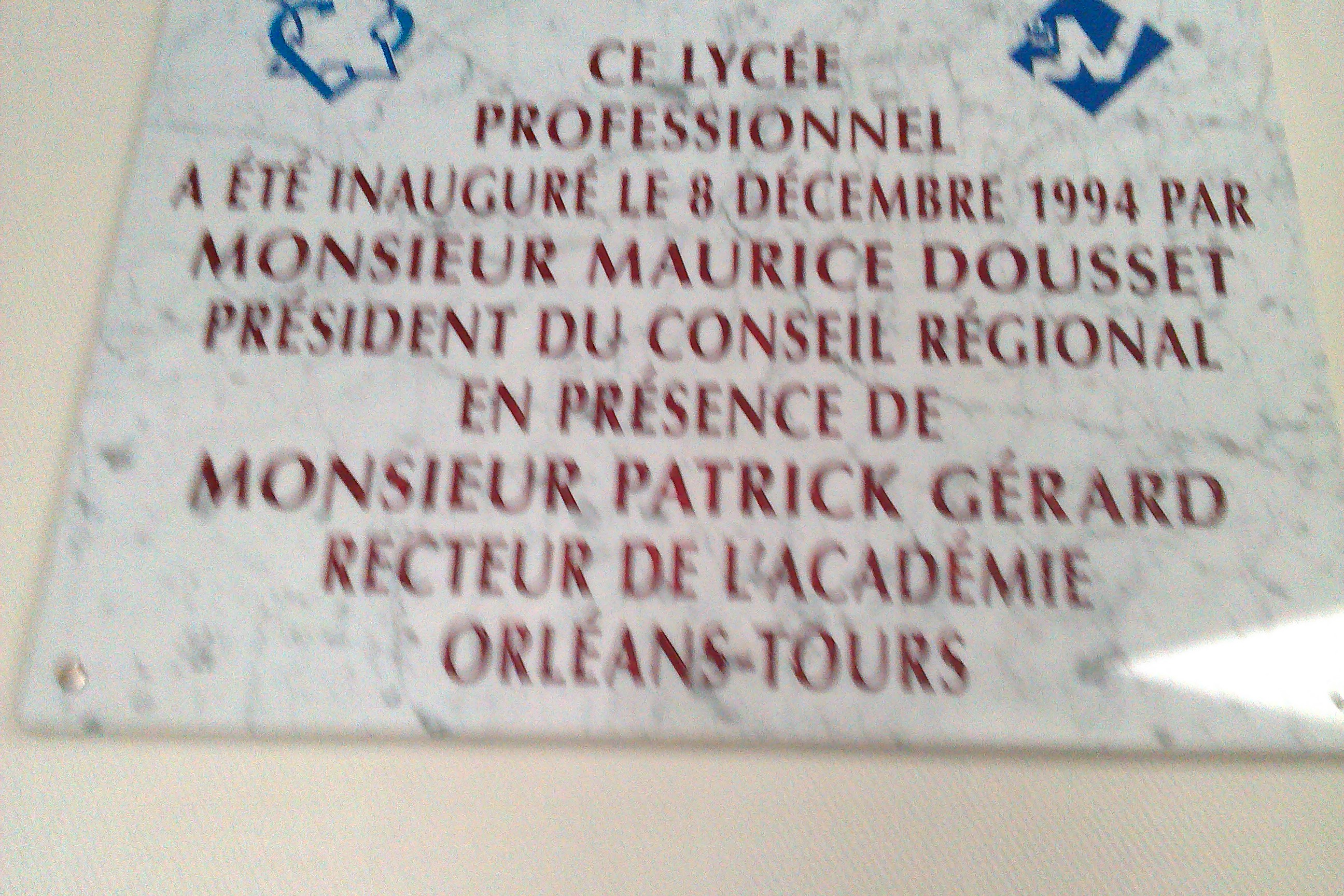 Plaque historique de l'inauguration du Lycée Jeannette-Verdier de Montargis (Loiret)